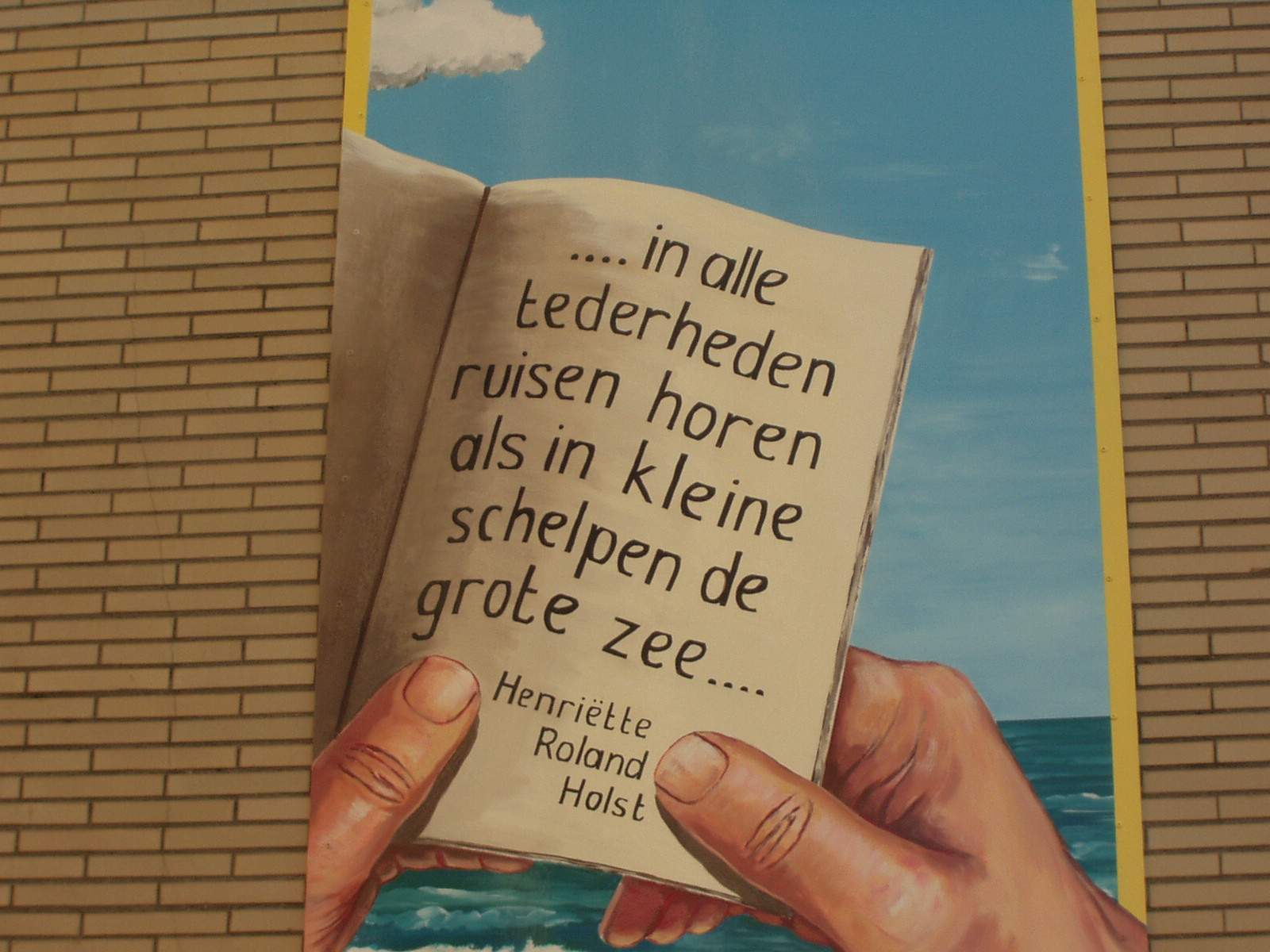 Vuurtorenplein, bij Boekhandel Van der Meer, onthuld: 19 mei 2005. Fraaie buitenschildering: een zeegezicht in frisse, heldere kleuren, met op de voorgrond twee handen, die een boek vasthouden, waarin een dichtregel staat geschreven. Het is een stukje uit het gedicht ‘De zachte krachten’ van Henriëtte Roland Holst. Het kunstwerk is door Martha Baalbergen van Boekhandel Van der Meer bekostigd, uit de Bonnikeprijs 2001. ‘... in alle tederheden, ruisen horen, als in kleine schelpen, de grote zee’